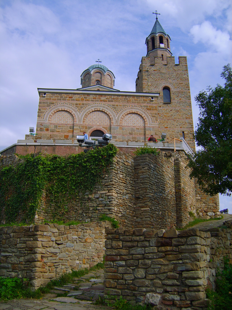 Патриаршеската църква "Възнесение" на историческият хълм Царевец, Велико Търново.